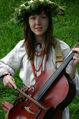 Ася, Країна мрій-2006